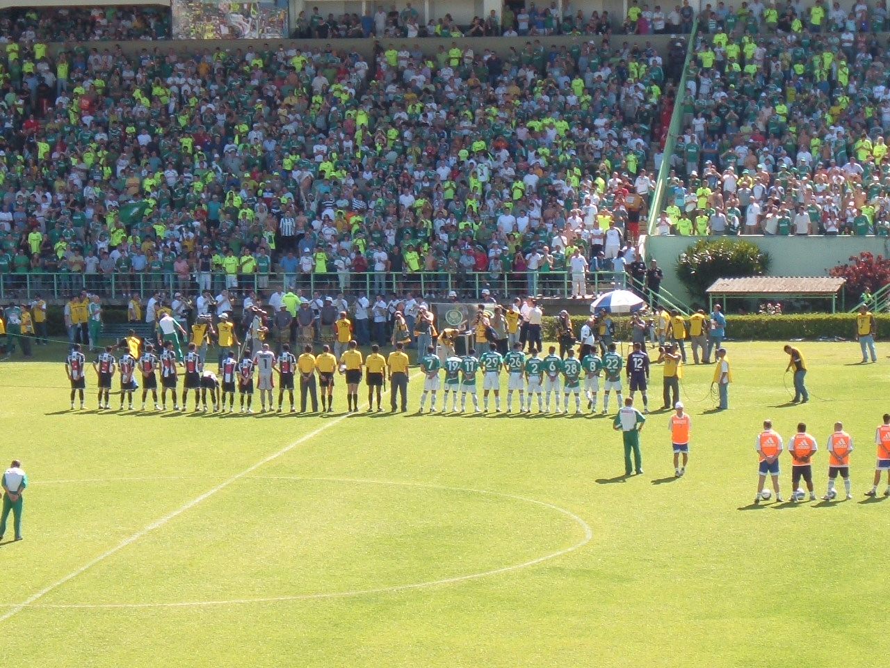 Equipes do Atlético e do Palmeiras perfiladas para cantar o Hino Nacional antes de partida do Campeonato Brasileiro de 2007 no Estádio Palestra Itália.